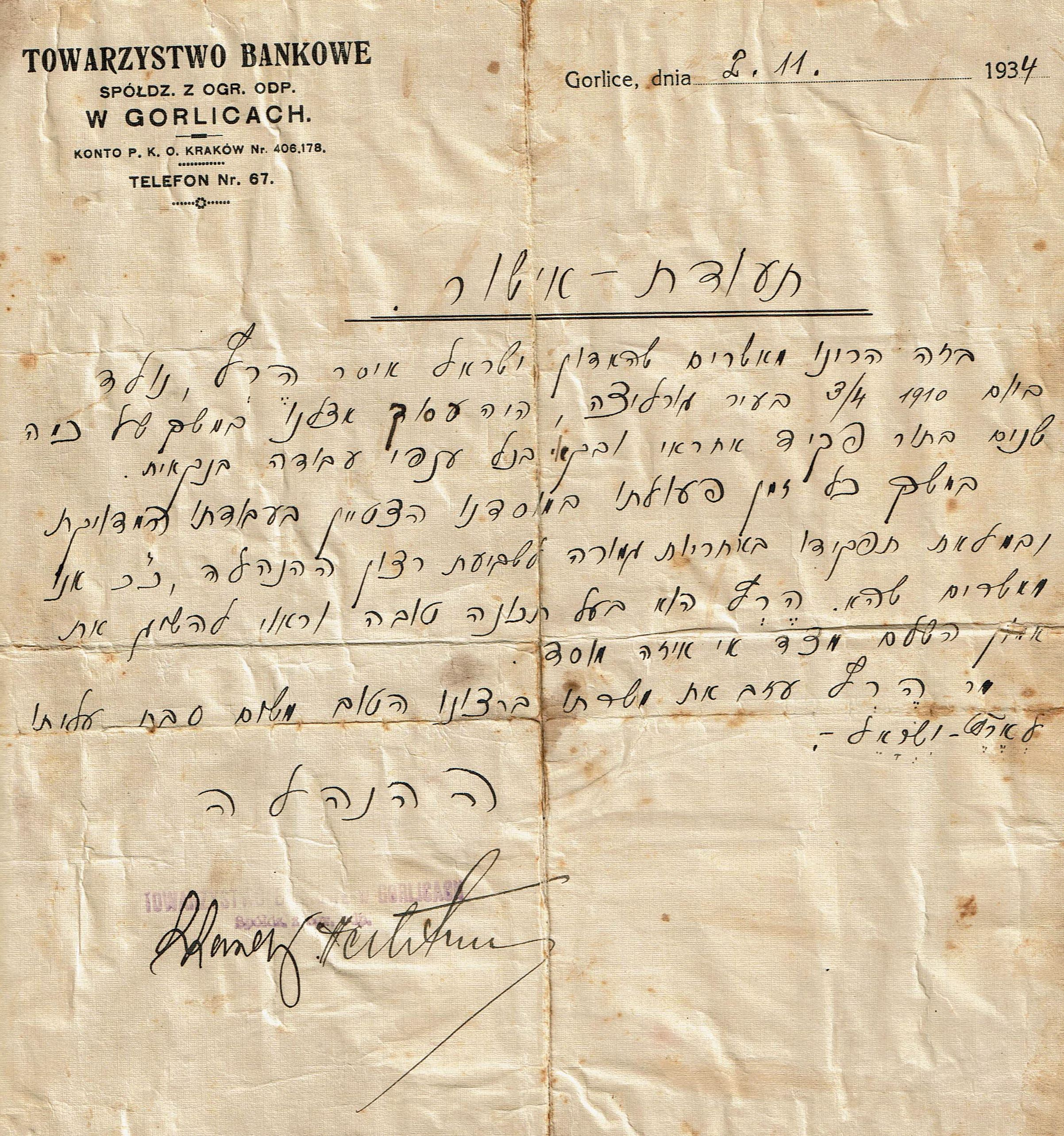 אישור מהבנק היהודי "טוורז'יסבו באנקובה", כתוב עברית, שניתן לישראל הרץ, לקראת עלייתו ארצה, 1934